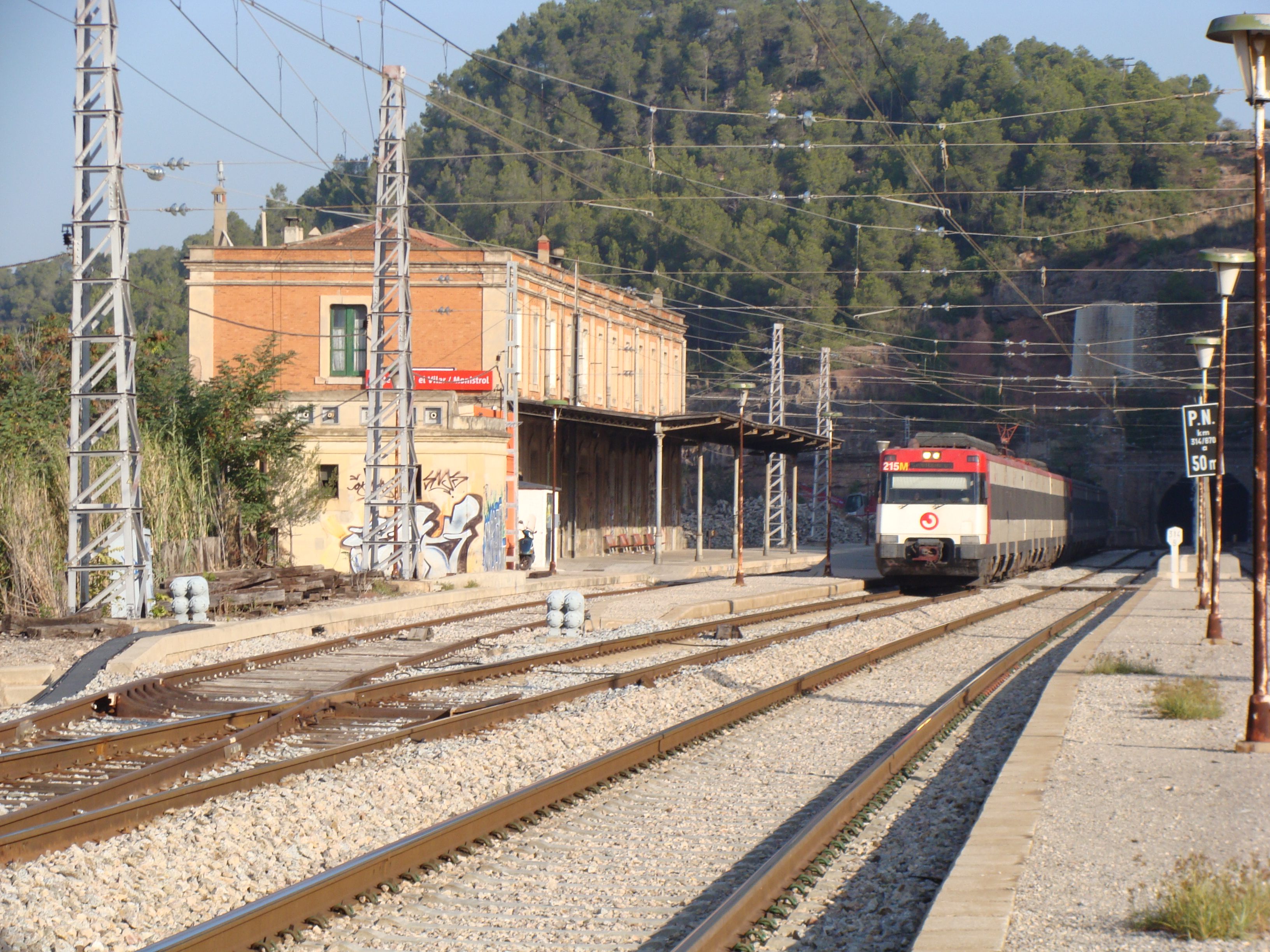 Estació de Castellbell i el Vilar - Monistrol, unitat 447 aturada en direcció Terrassa-Barcelona. Estación de Castellbell i el Vilar - Monistrol, unidad 447 parada en dirección Terrassa-Barcelona.